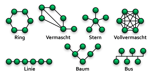 Schematische Veranschaulichung der grundlegenden Arten von Netzwerktopologien.